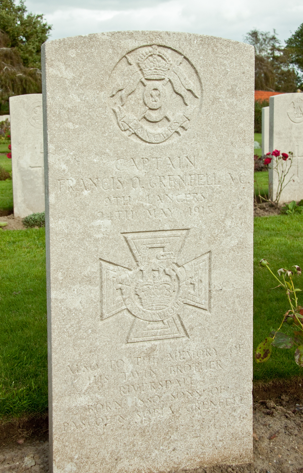 Vlamertinghe Military Cemetery. Francis Octavius Grenfell.